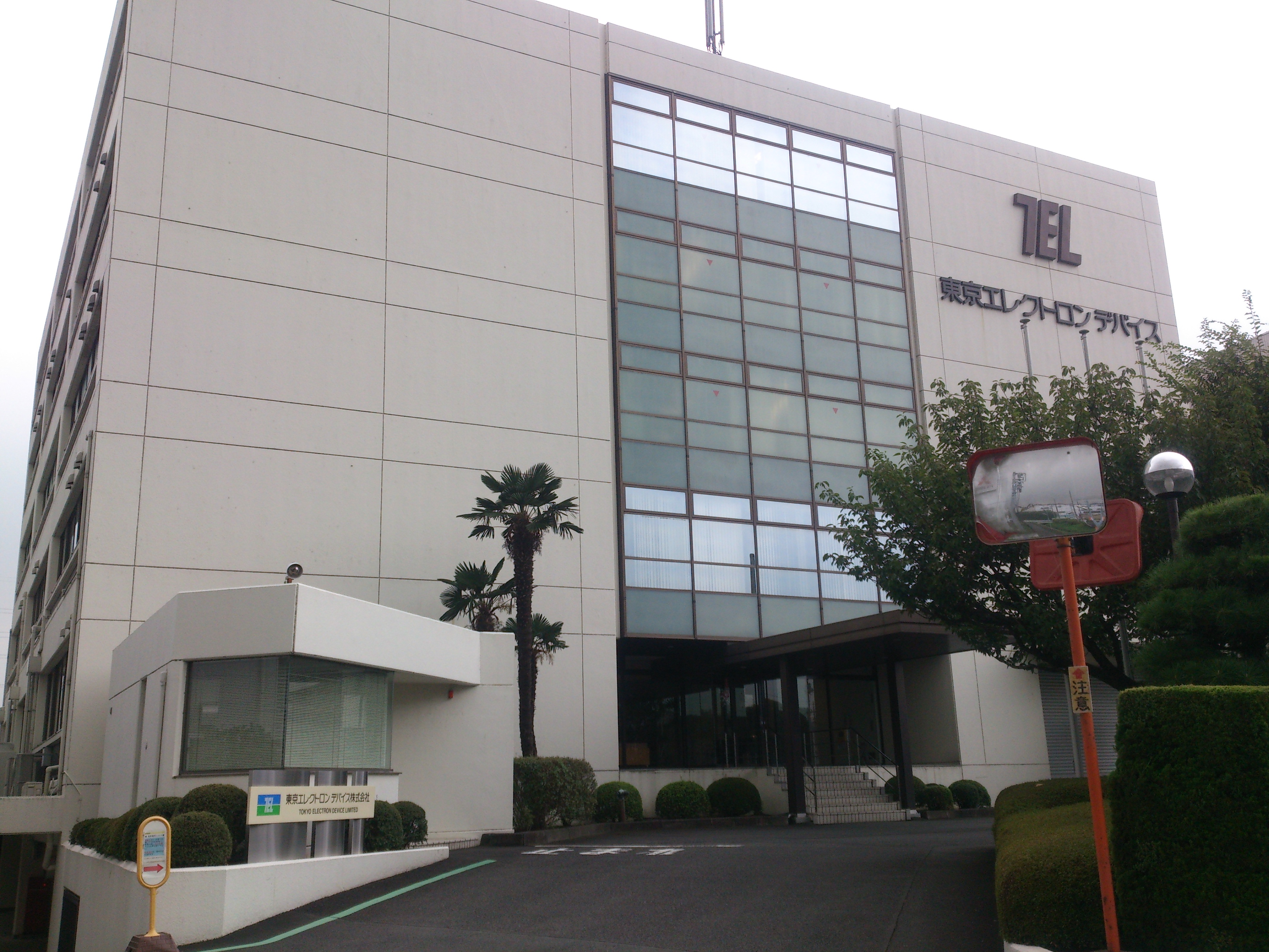 東京エレクトロンデバイス 横浜エンジニアリングセンター 横浜市都筑区東方町